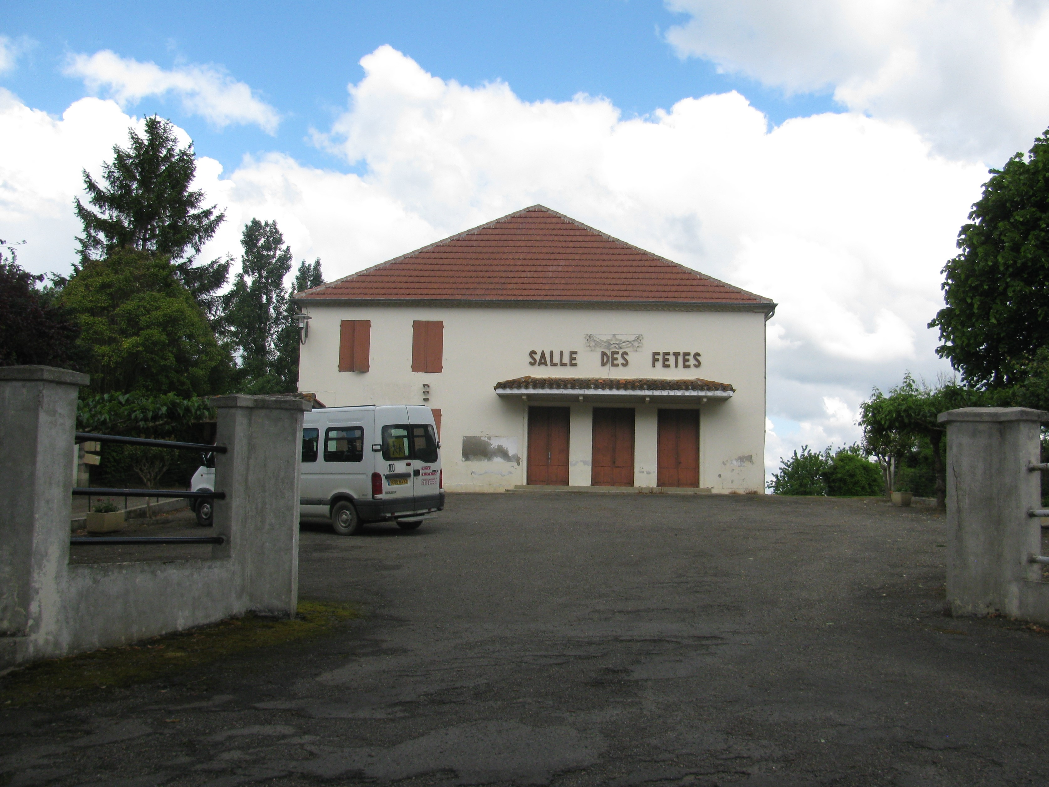 salle des fêtes de Belmont (Gers)